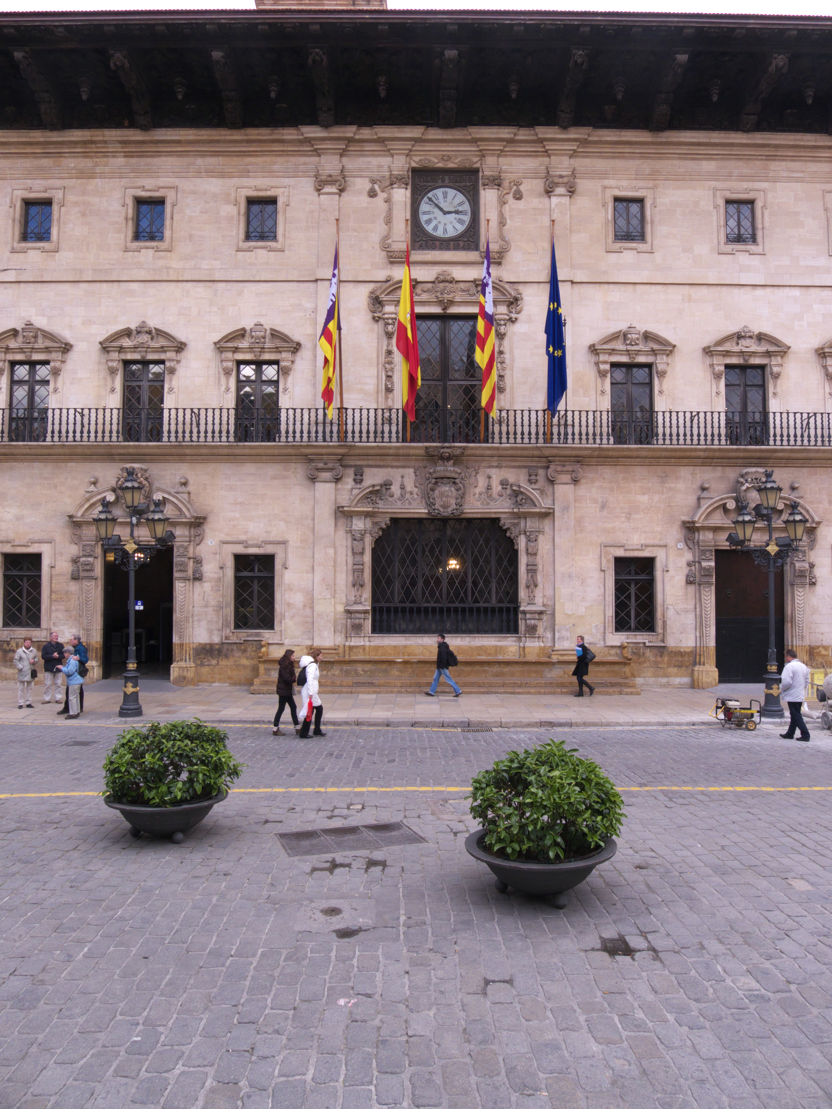 Del Gran y General Consejo del Reino de Mallorca, y del Consejo de la Ciudad de Mallorca, pasando por las Casas de la Universidad, al Ayuntamiento de Palma de Mallorca (1716).